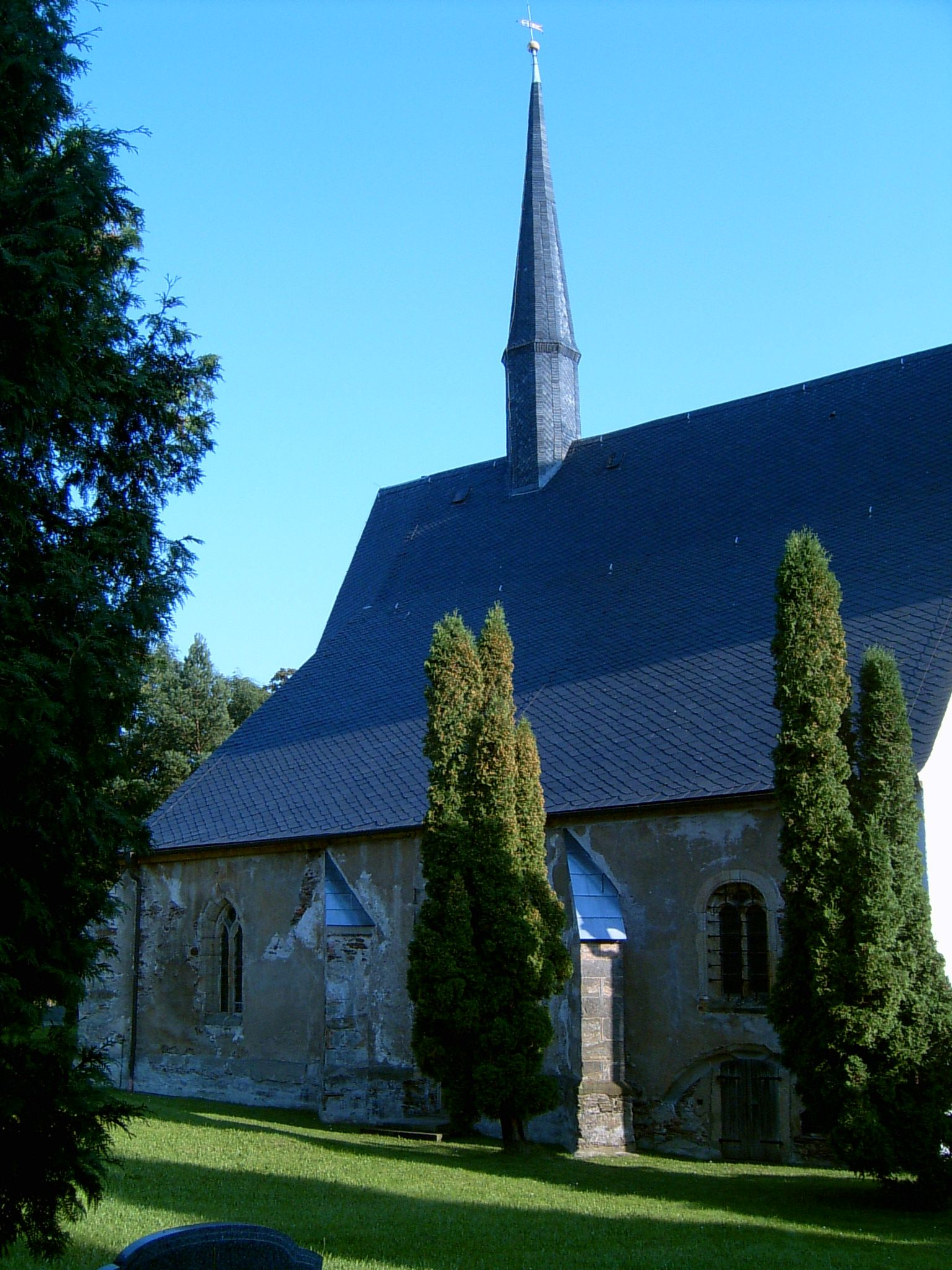 Wendelinkapelle, ältester Bestandteil der Kirche St. Nikolai in Langhennersdorf